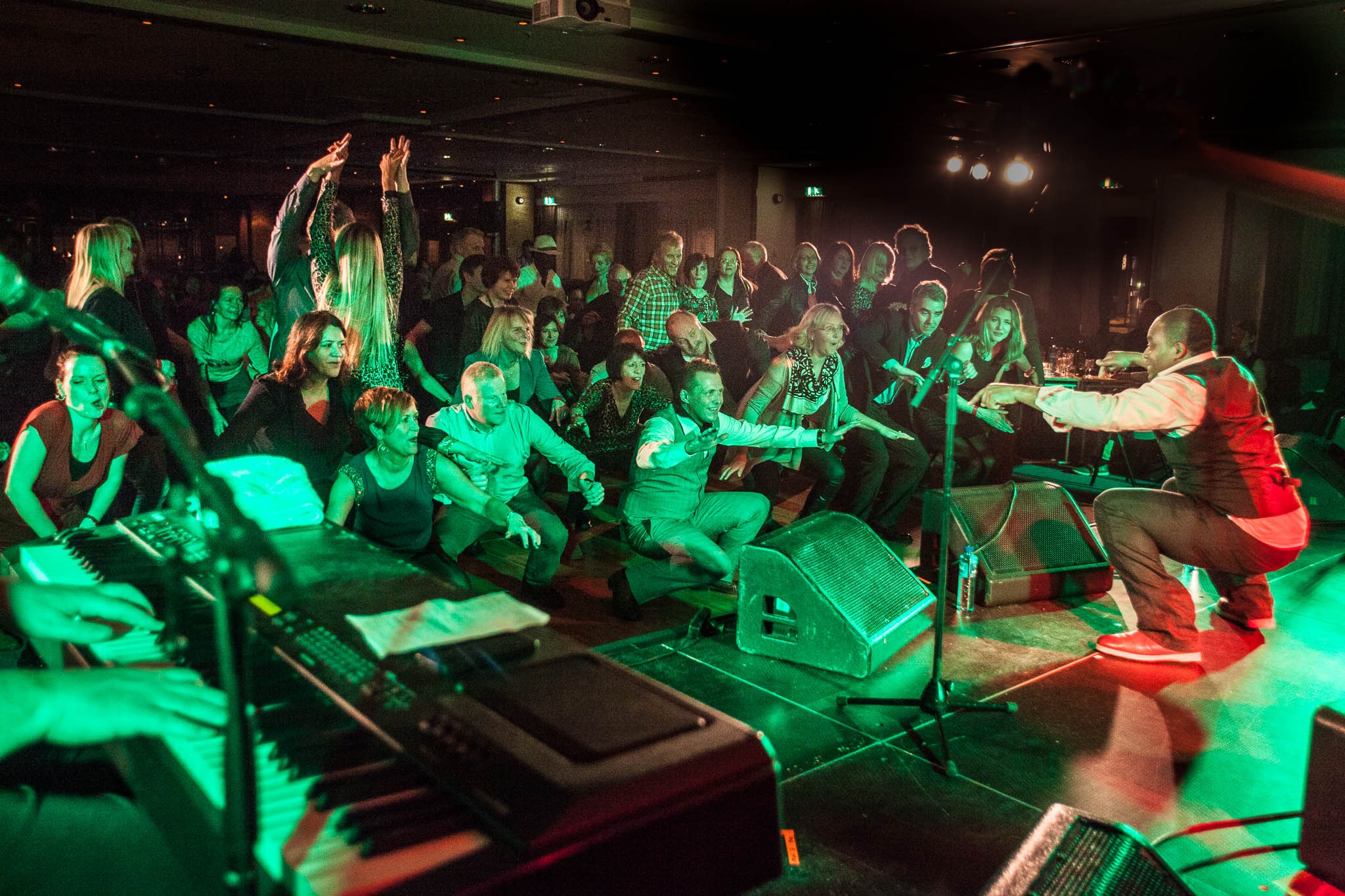 Bandet Mambo Compagnero får med seg publikum under Bodø Jazz Open 2013